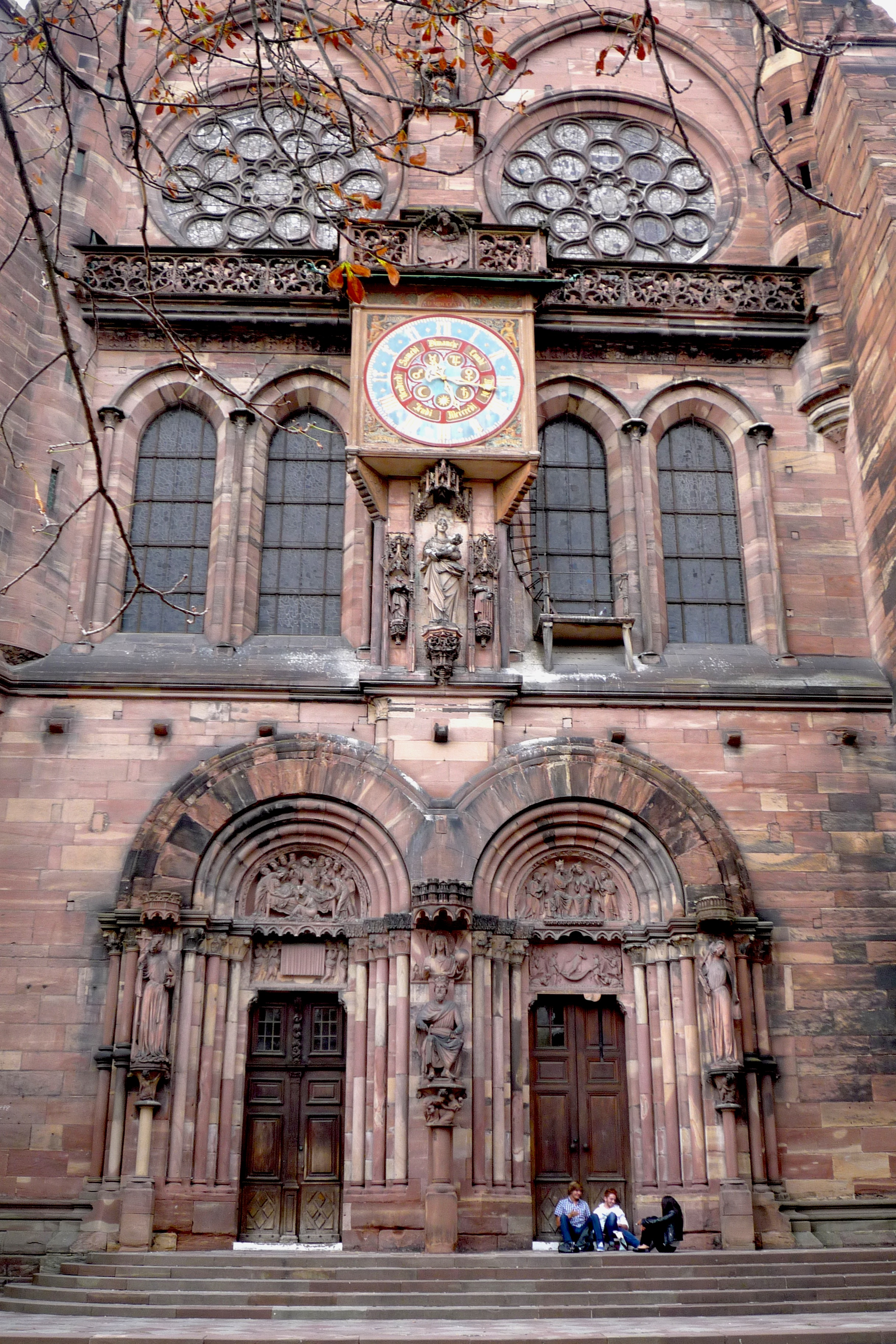 Strasbourg, Cathédrale Notre-Dame, le portail sud.